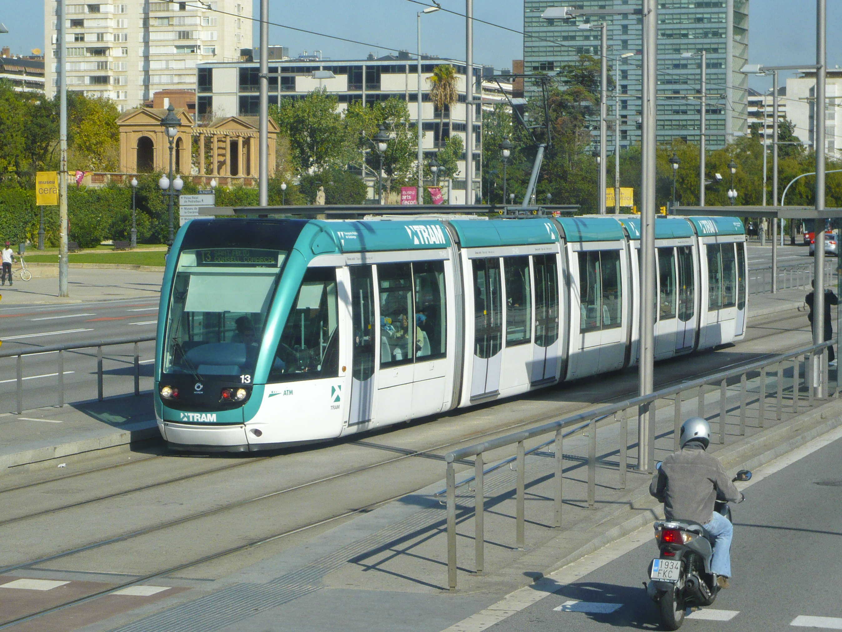 Barcelona Tram